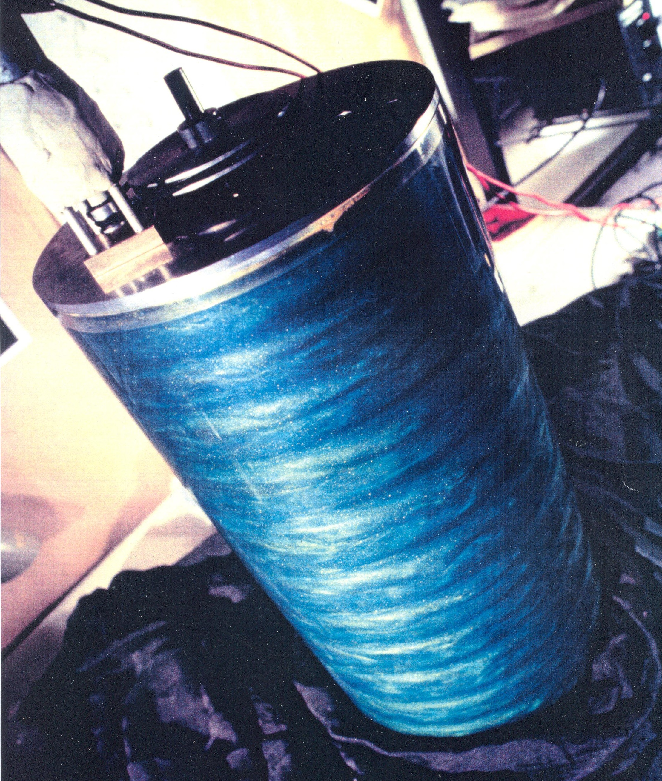 Taylor-Wirbel zwischen zwei Zylinderwänden, sichtbar gemacht mit einer Farb-Partikel-Mischung in Wasser